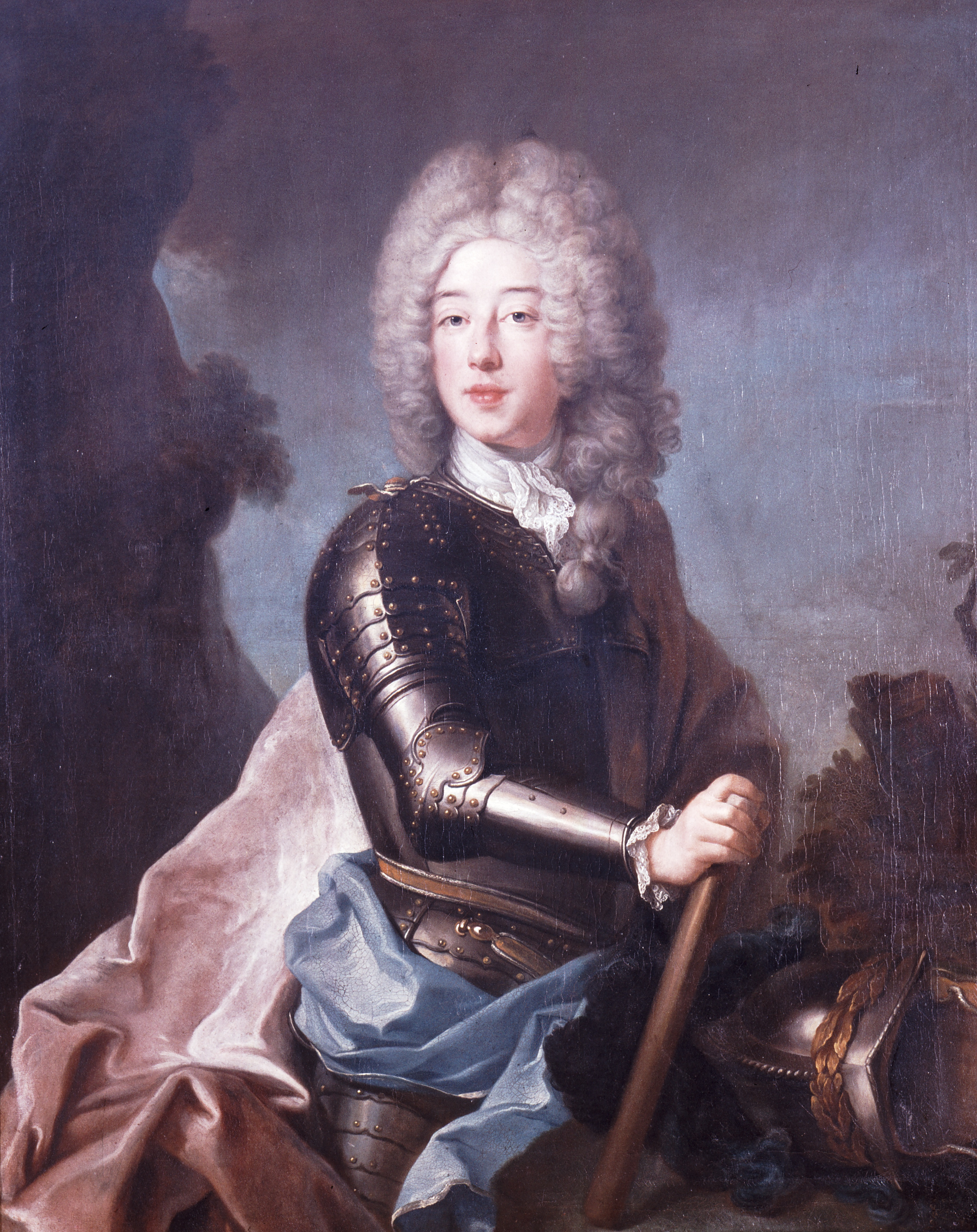 Portrait of Philipp Moritz von Bayern (1698-1719)